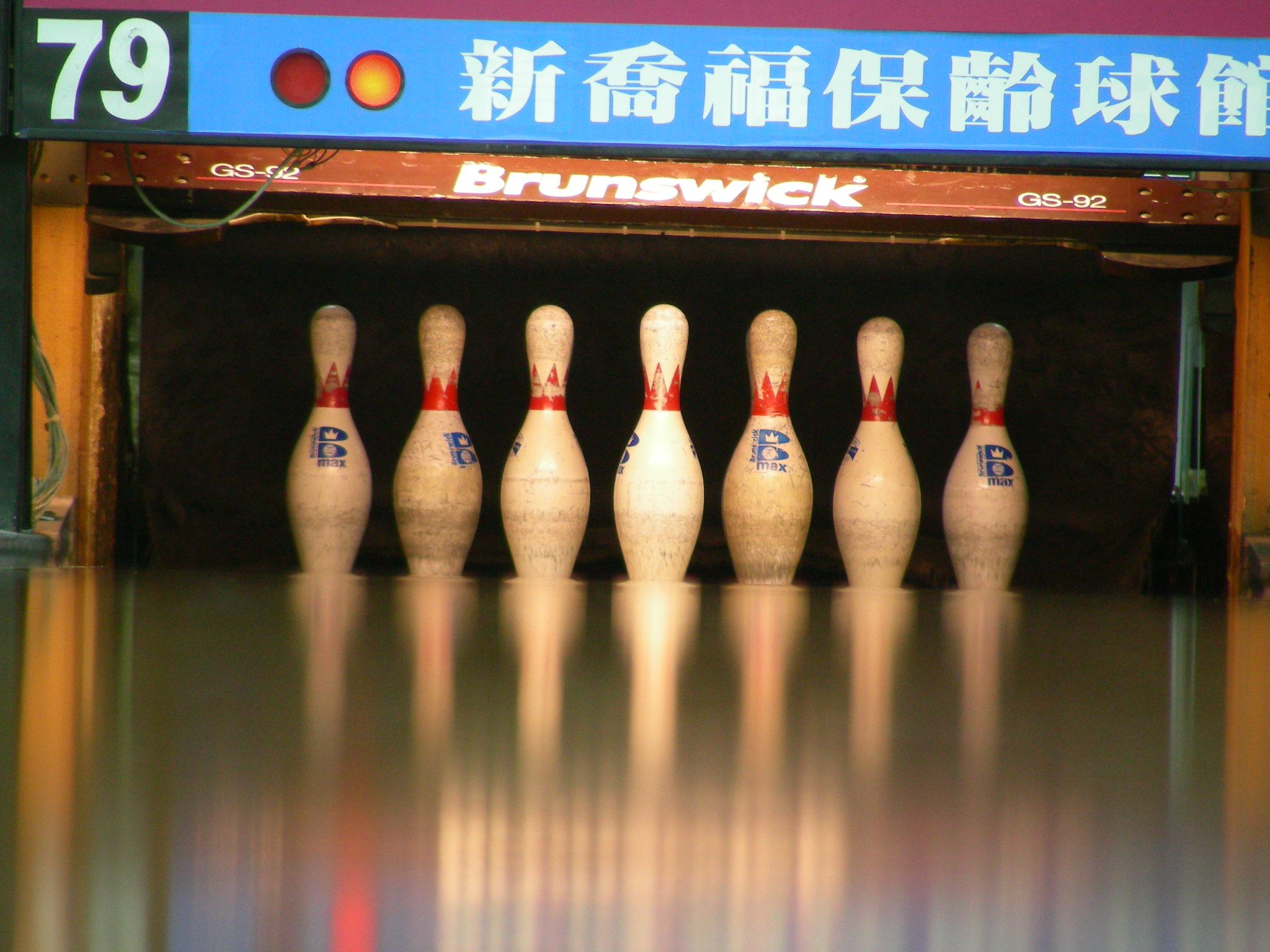 Bowling Road